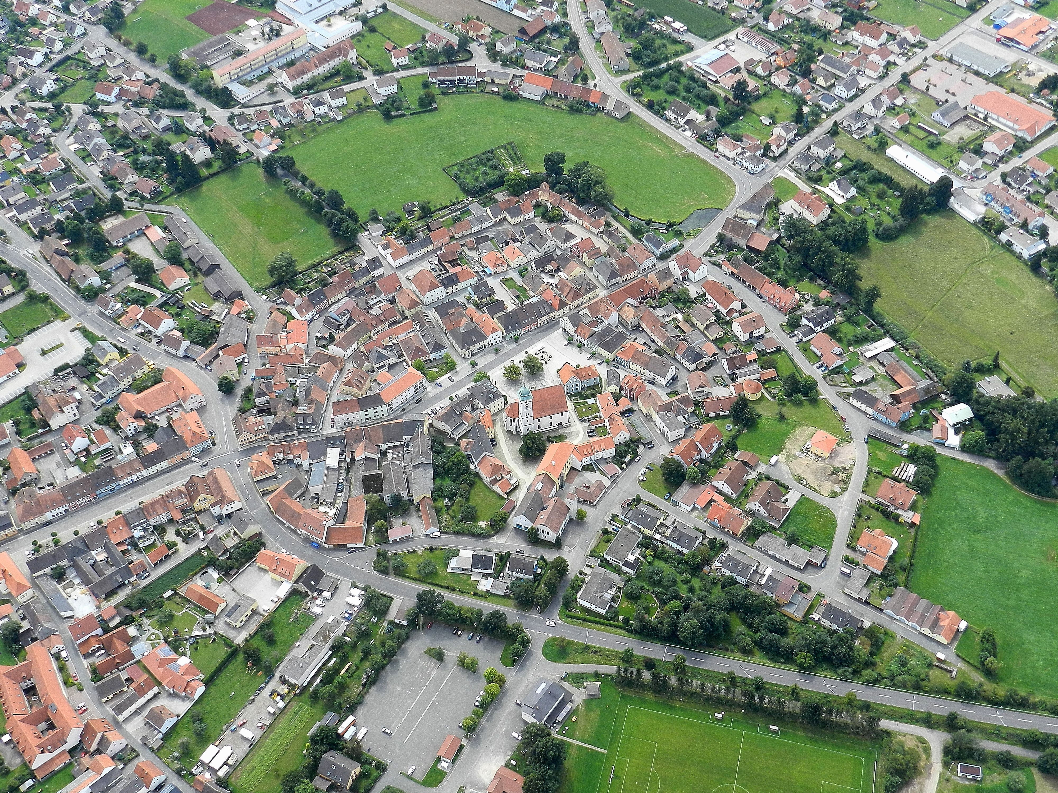 Pfreimd, Landkreis Schwandorf, Oberpfalz, Bayern, Stadtkern (2011)